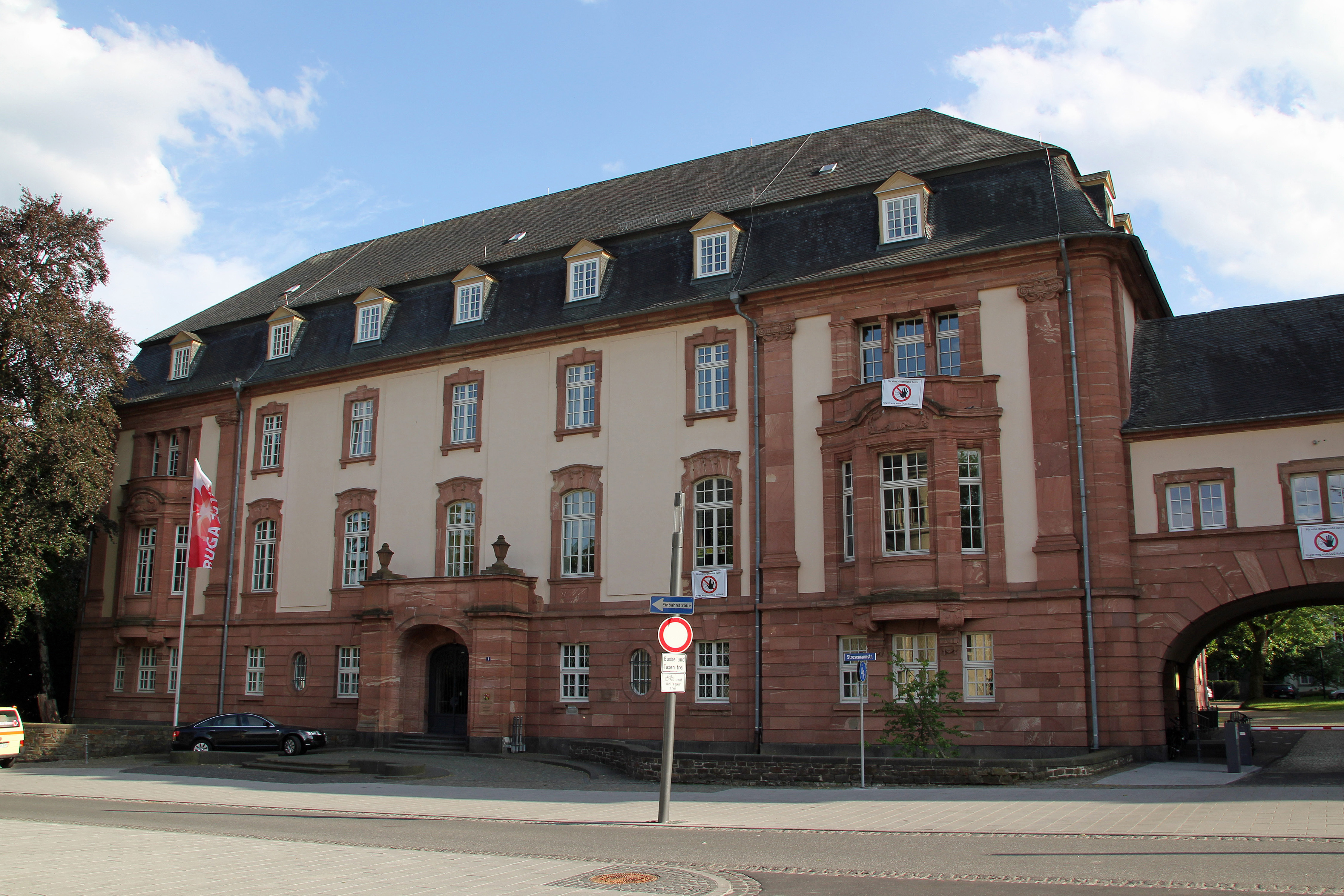 Koblenz im Buga-Jahr 2011 - Die Dienstvilla des Oberpräsidenten der Rheinprovinz neben dem Oberpräsidium, heute Sitz des Oberlandesgerichts Koblenz